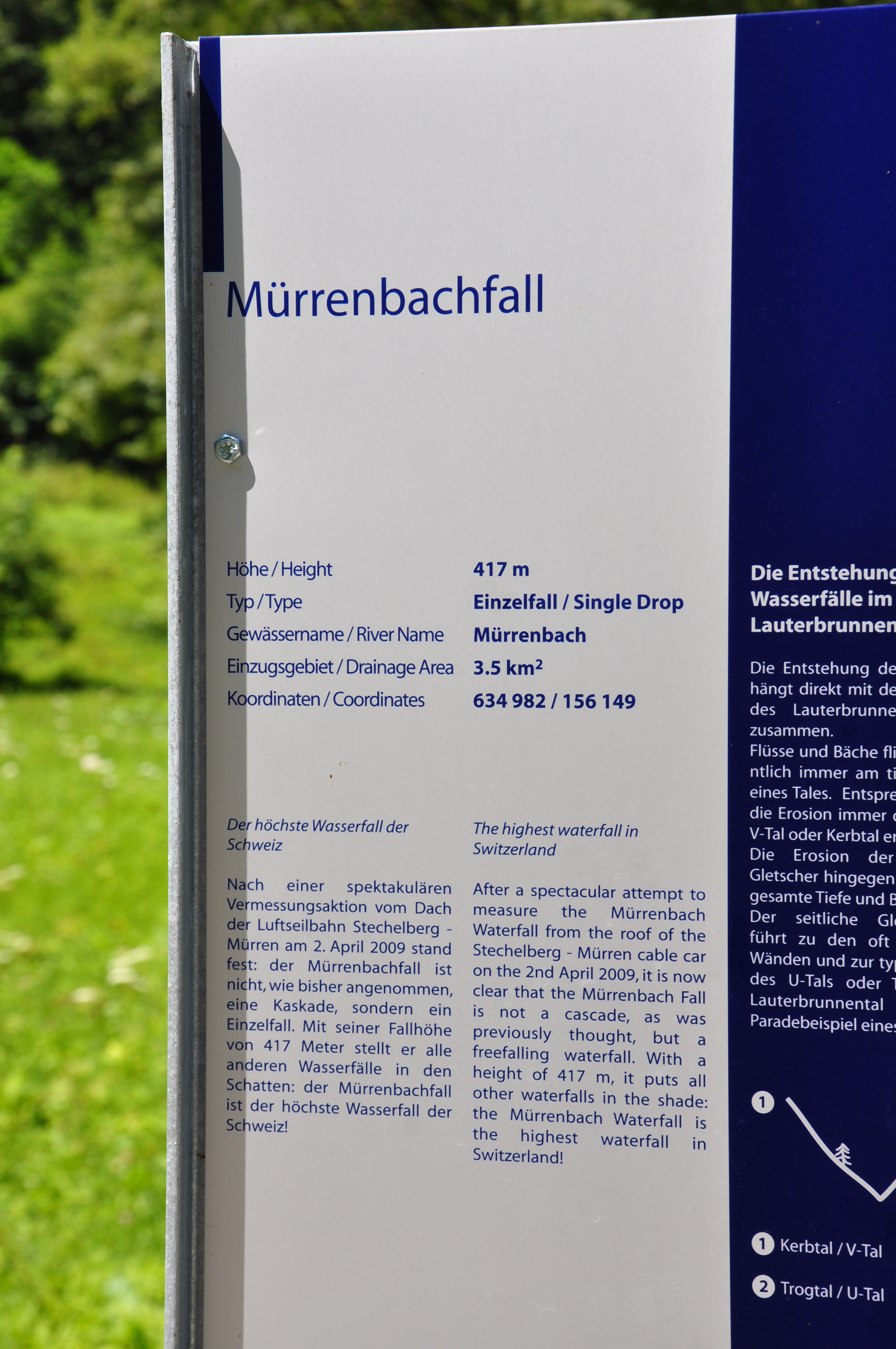 Switzerland, Canton of Bern, Mürrenbachfall (highest waterfall of Switzerland)